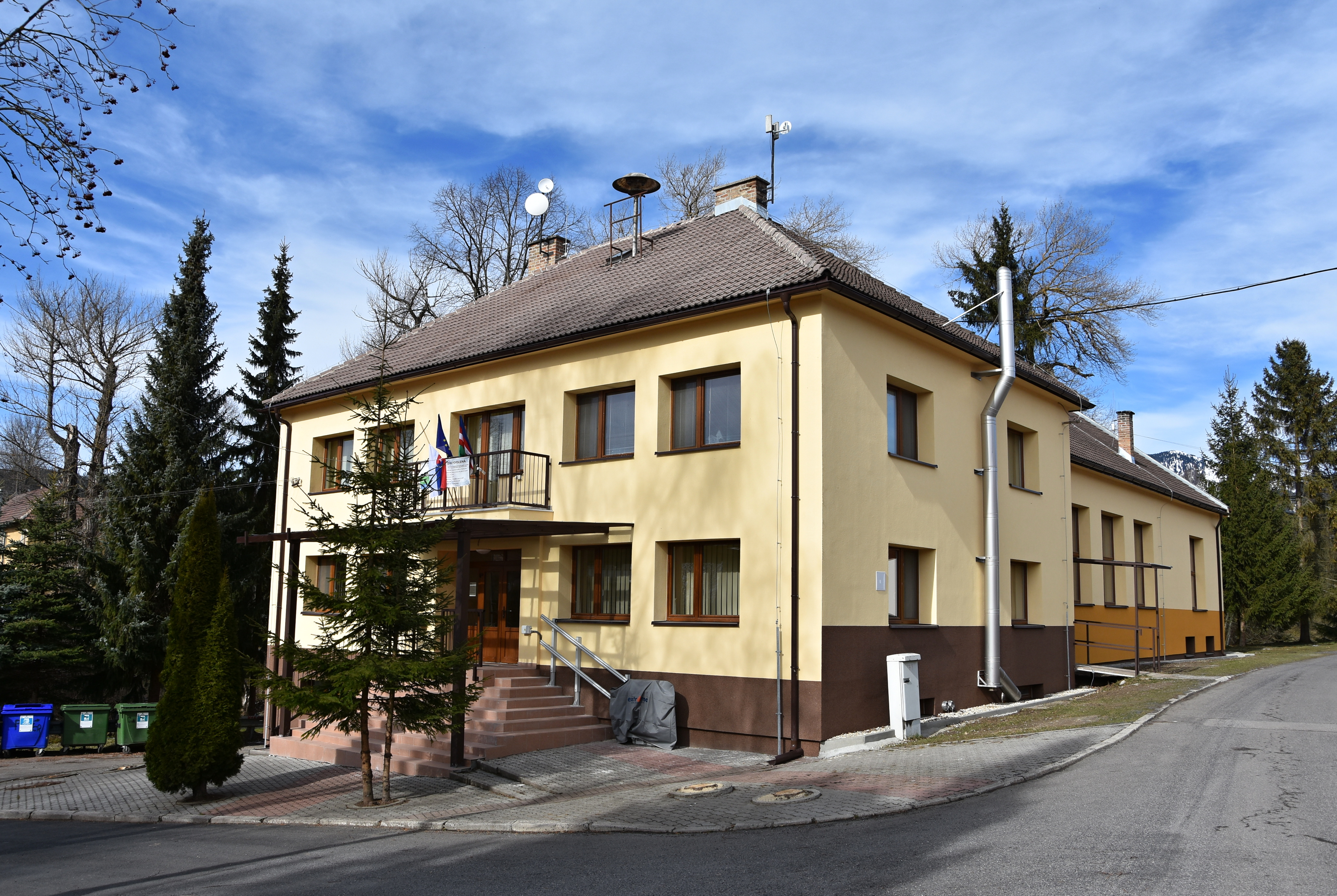 Pavlova Ves, okres Liptovský Mikuláš, Slovensko - budova obecného úradu